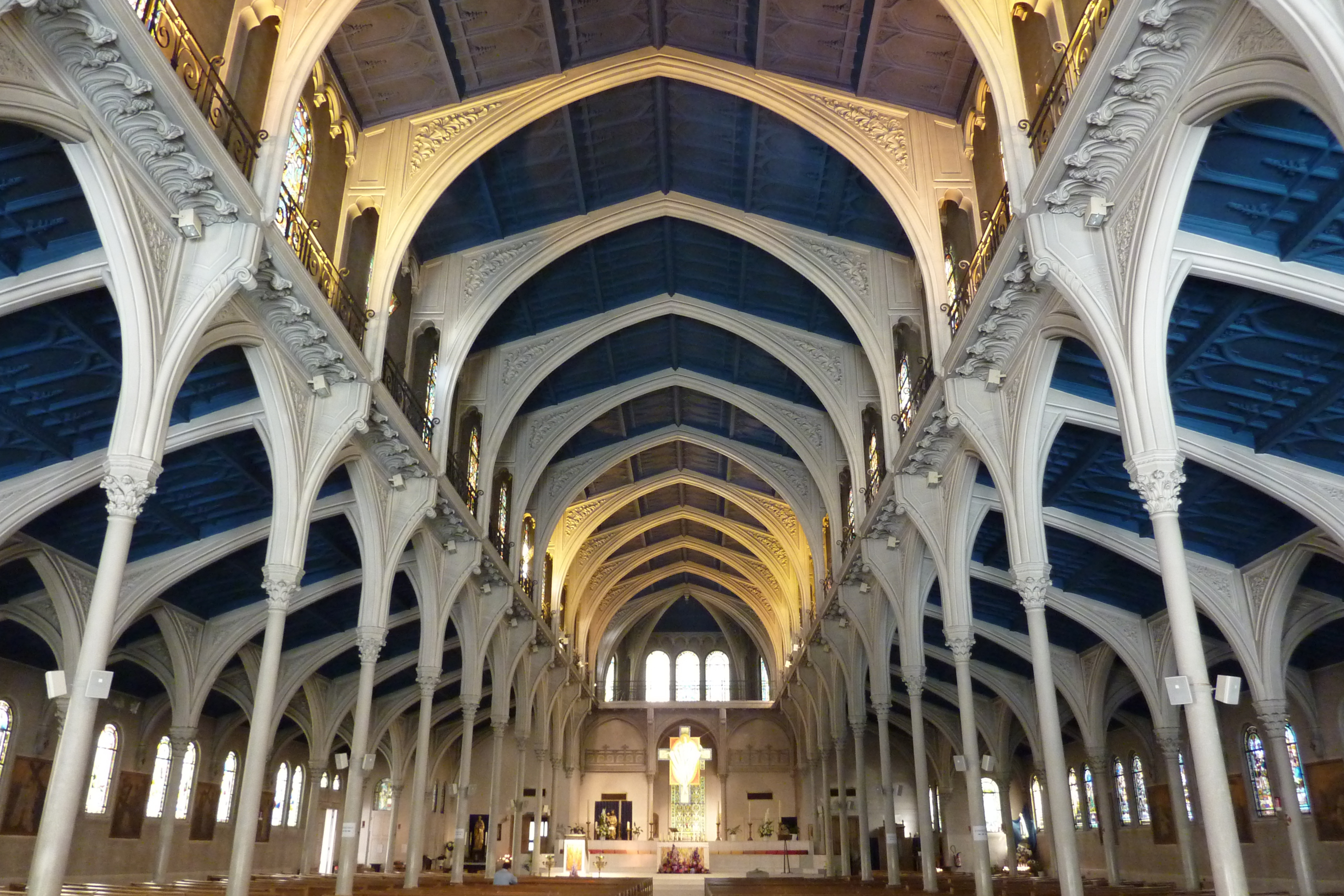 Mittel- und Seitenschiffe, Gurtbogen. Innenansicht der Kirche Saint-Honoré d'Eylau (Avenue Raymond-Poincaré im 16. Arrondissement von Paris)